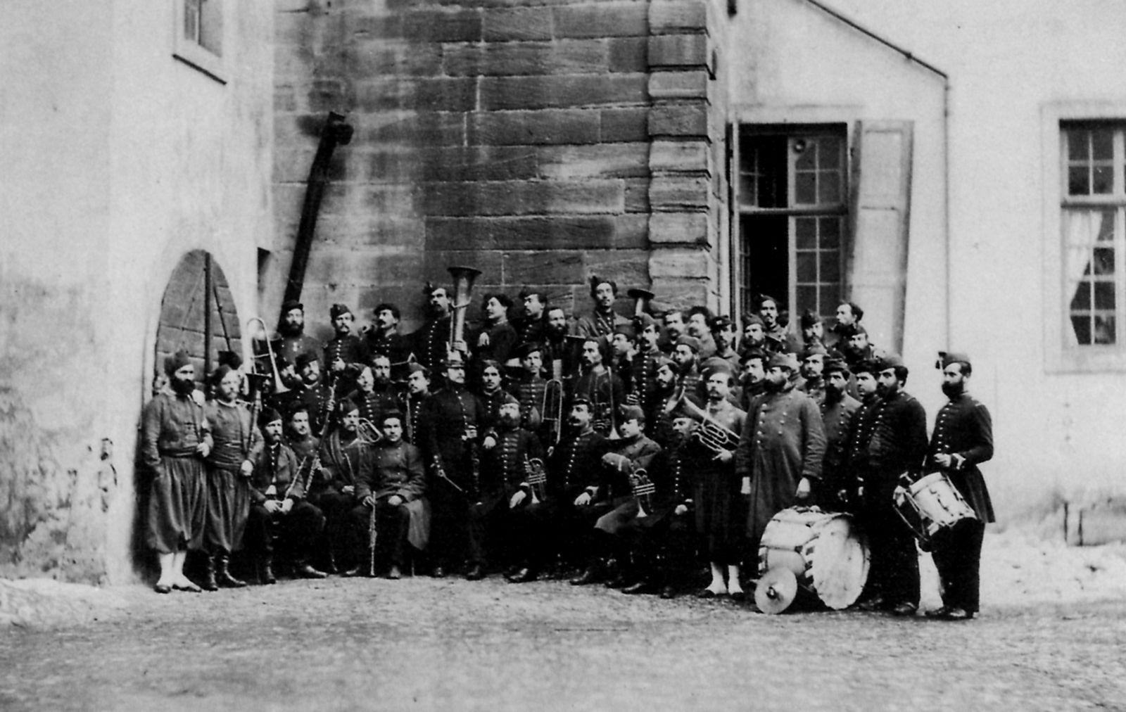 Als sogenanntes "Porträt; aus der Serie »Erinnerungen an 1870« schuf der Fotograf Hermann Emden diese Fotografie aus der Zeit des Deutsch-Französischen Krieges. Nach dem Bild-Titel zeigt es "Die Lagermusik der gefangenen Franzosen in Mainz unter der Leitung eines preußischen Dirigenten« ...